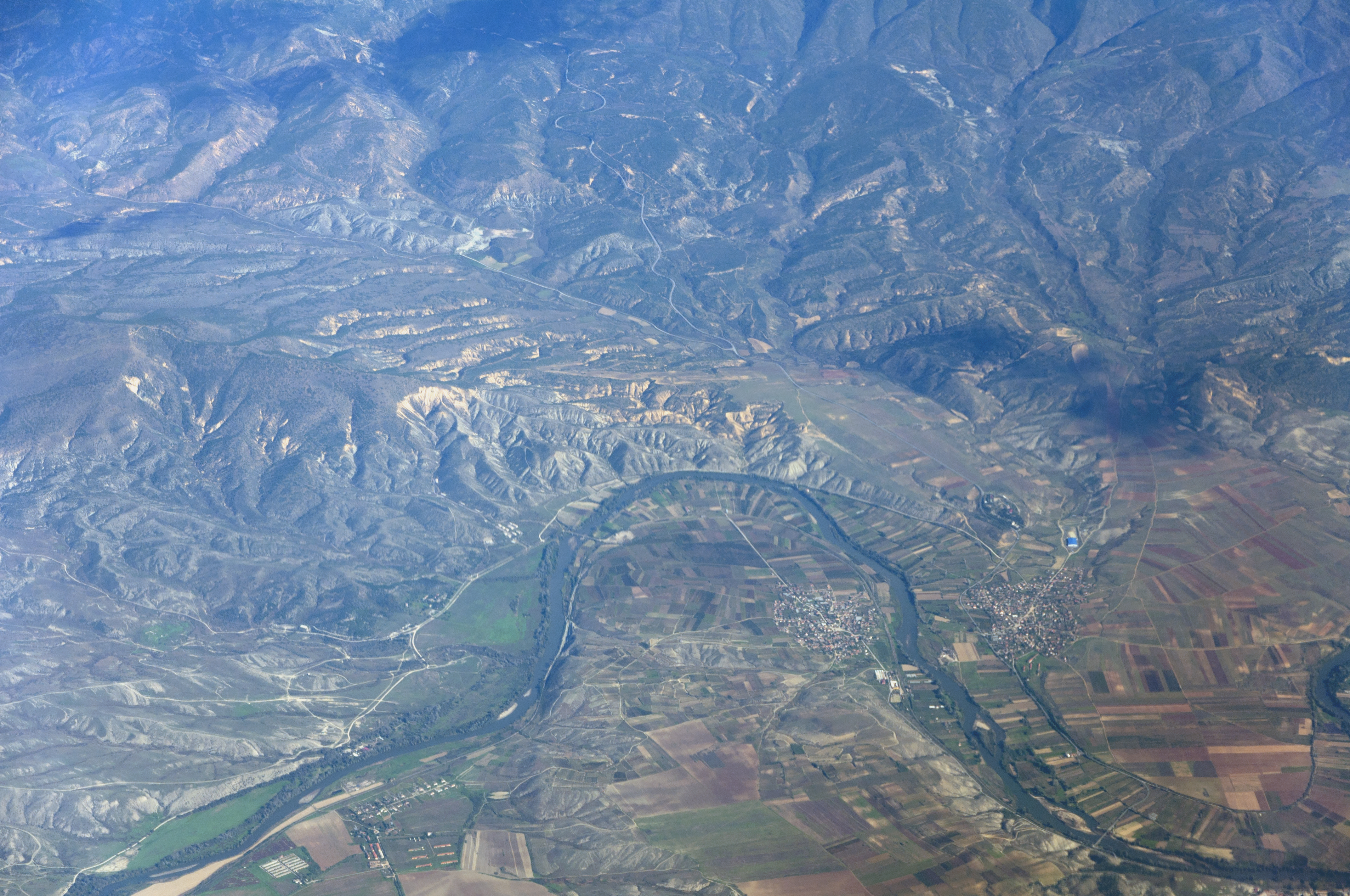 Aerial view overhead Drenovo Debrište in Macedonia